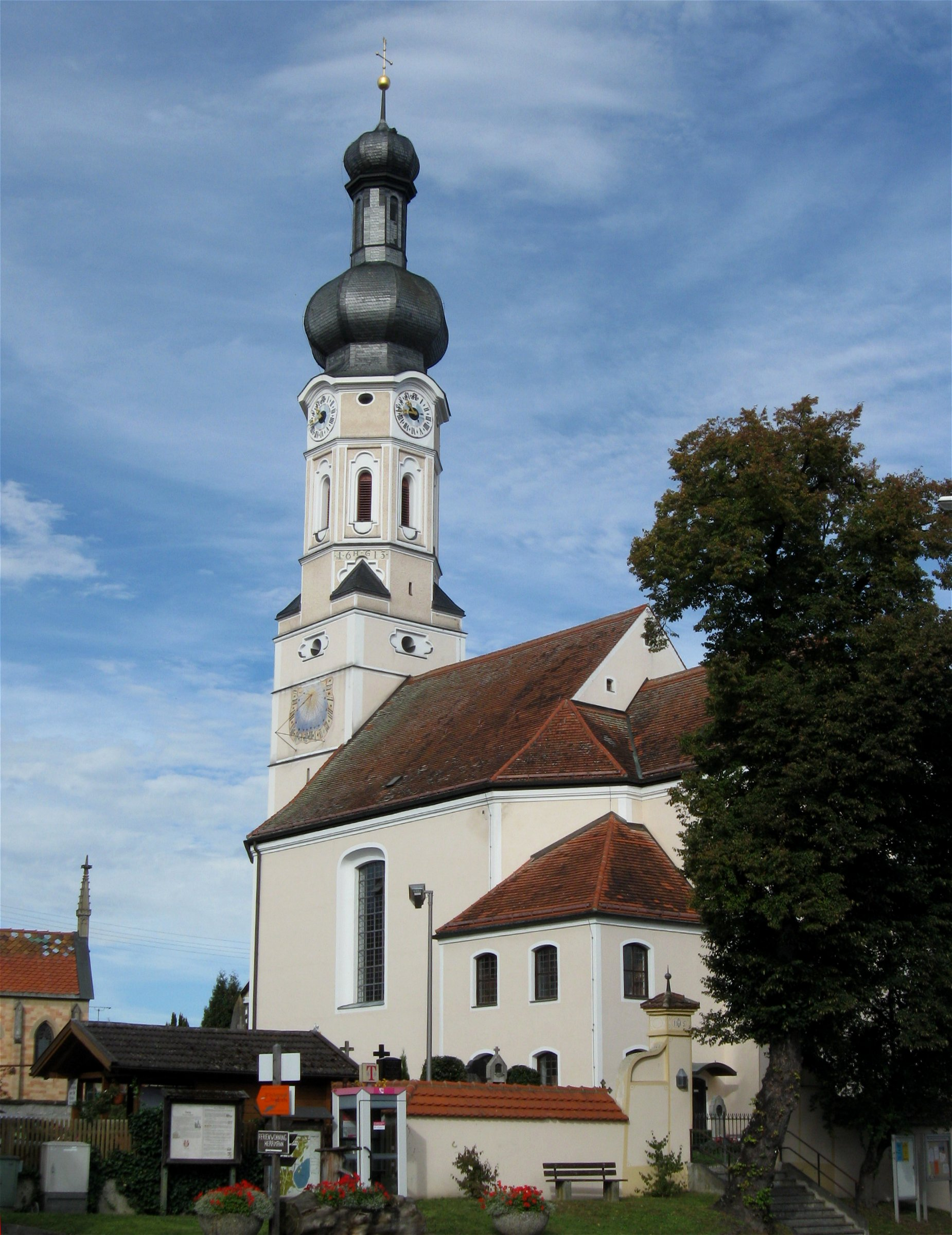 Pfarrkirche St. Johannes d. Täufer, Inning_am_Ammersee